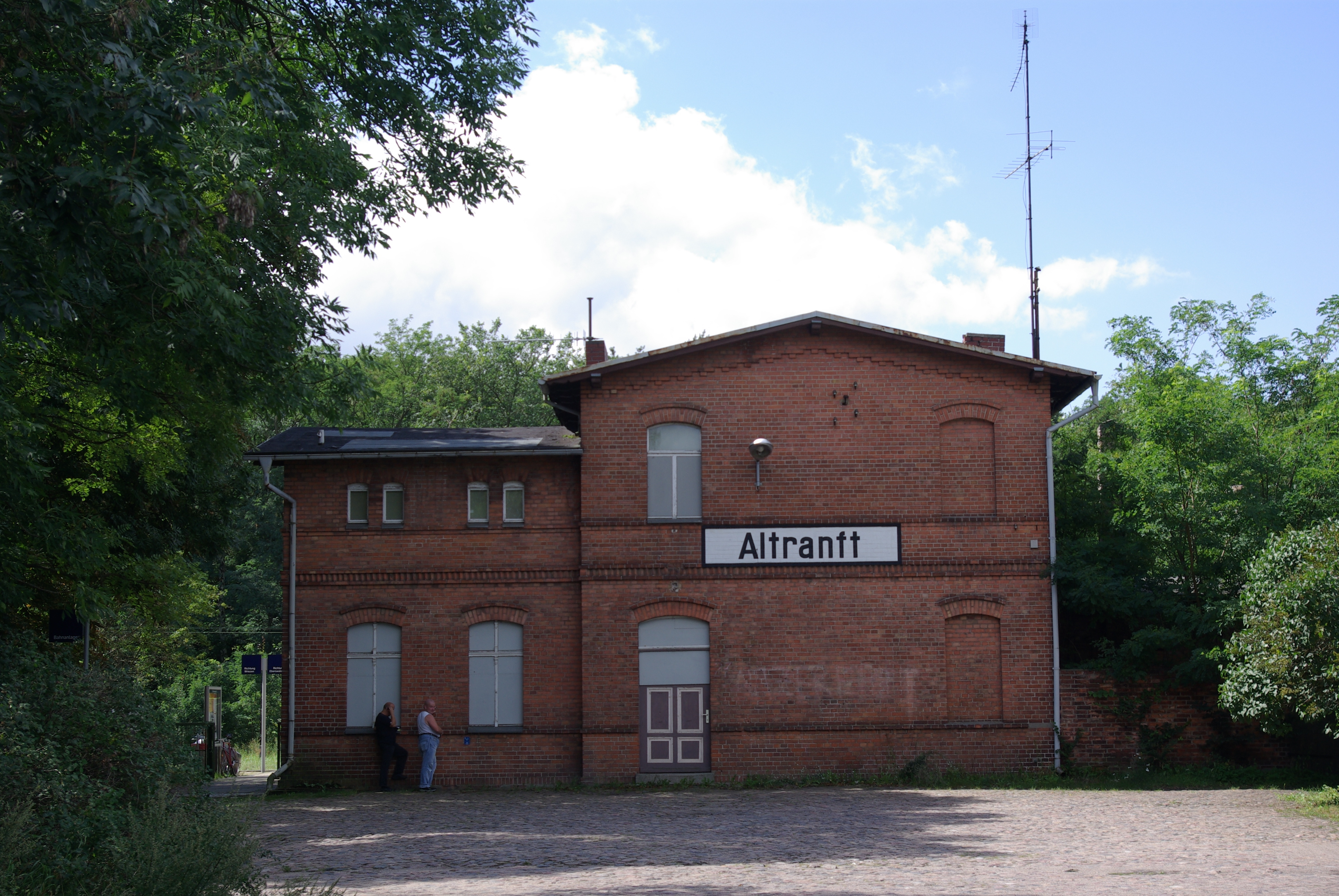 Bad Freienwalde (Oder) Ortsteil Altranft. Der Bahnhof steht unter Denkmalschutz.